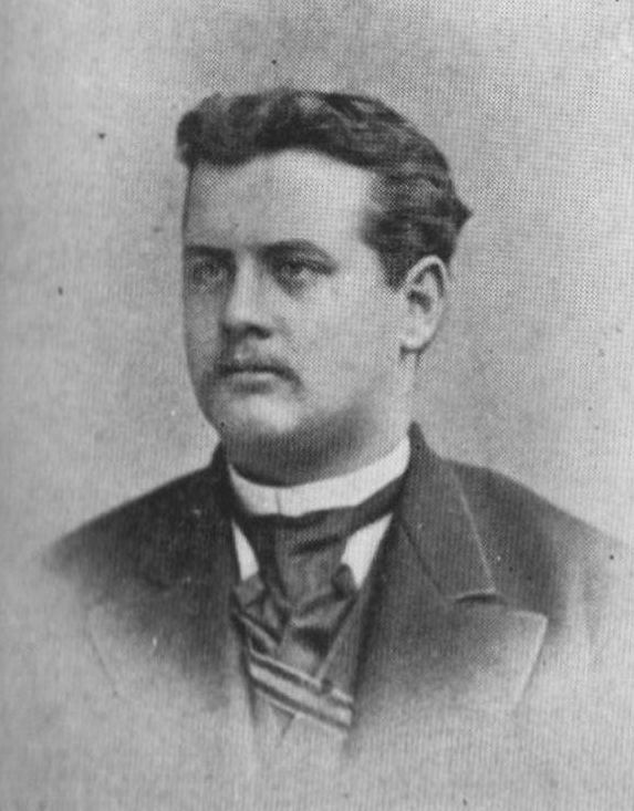 Fotografie von Graf Wilhelm von Bismarck als Angehöriger des Corps Borussia Bonn